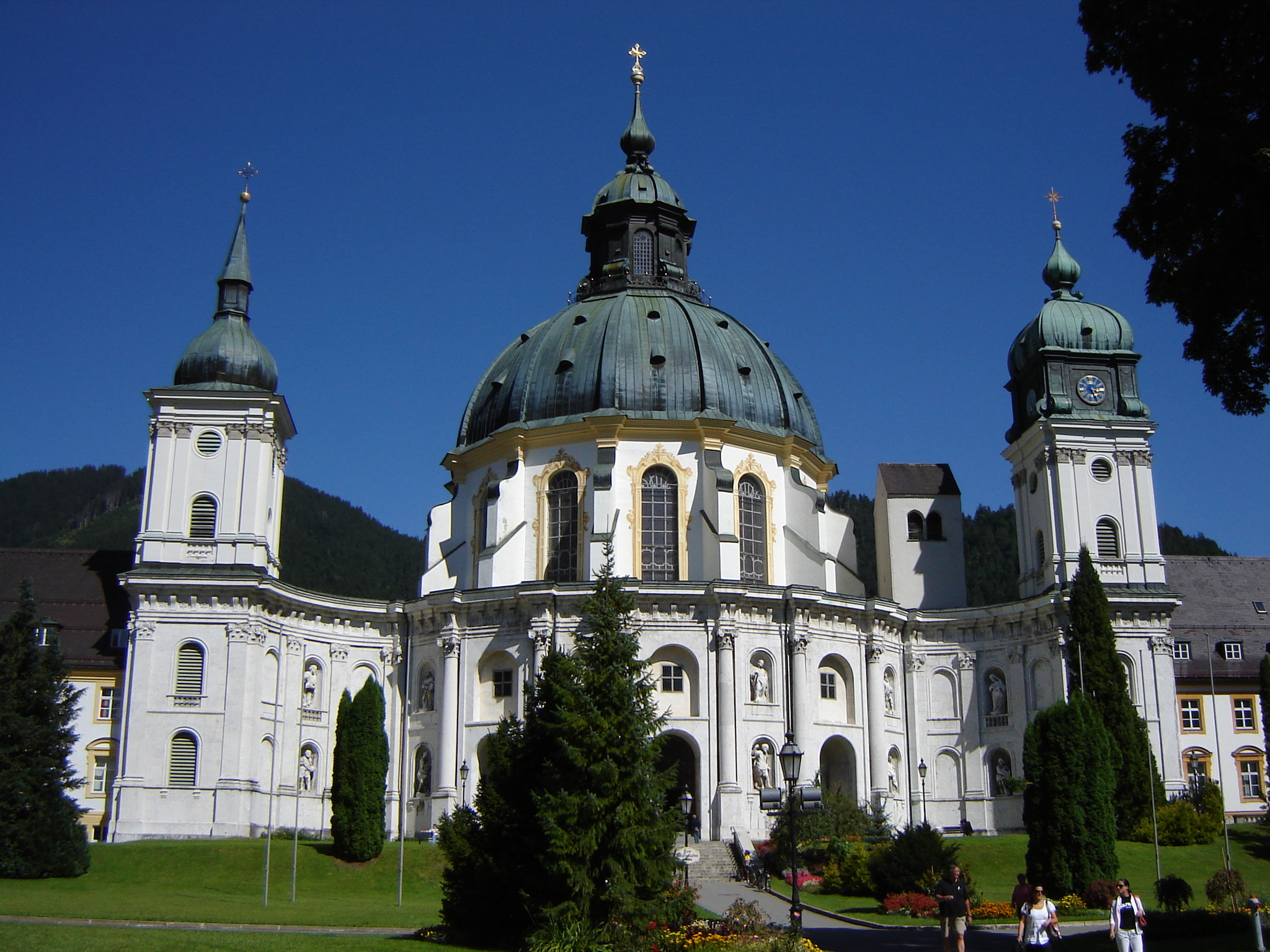 Facade of Kloster Ettal, Abbazia di Ettal - Bavaria